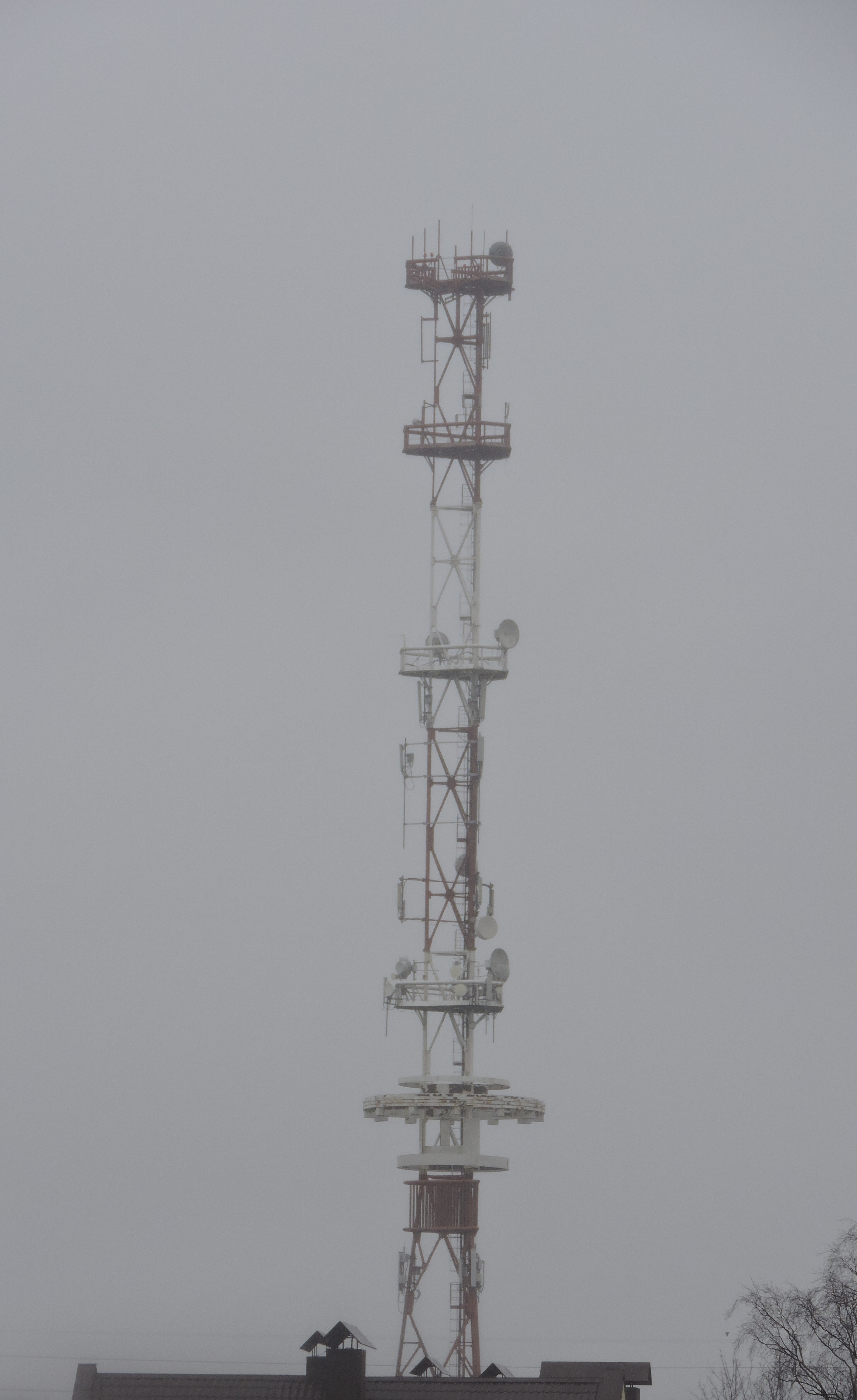 Вышка сотовой связи (Гатчина)